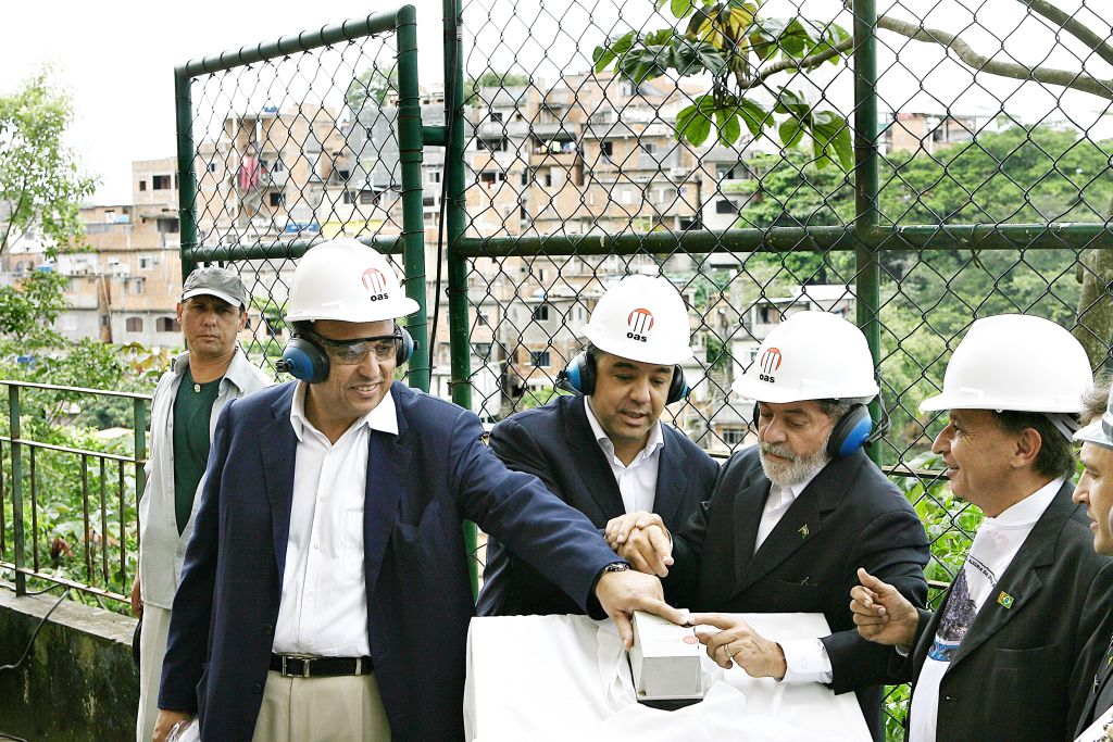 (portuguese) Presidente Luiz Inácio Lula da Silva (Brasil) e comitiva visitam conjunto de favelas do Cantagalo-Pavão-Pavãozinho na cidade do Rio de Janeiro (novembro 2007)